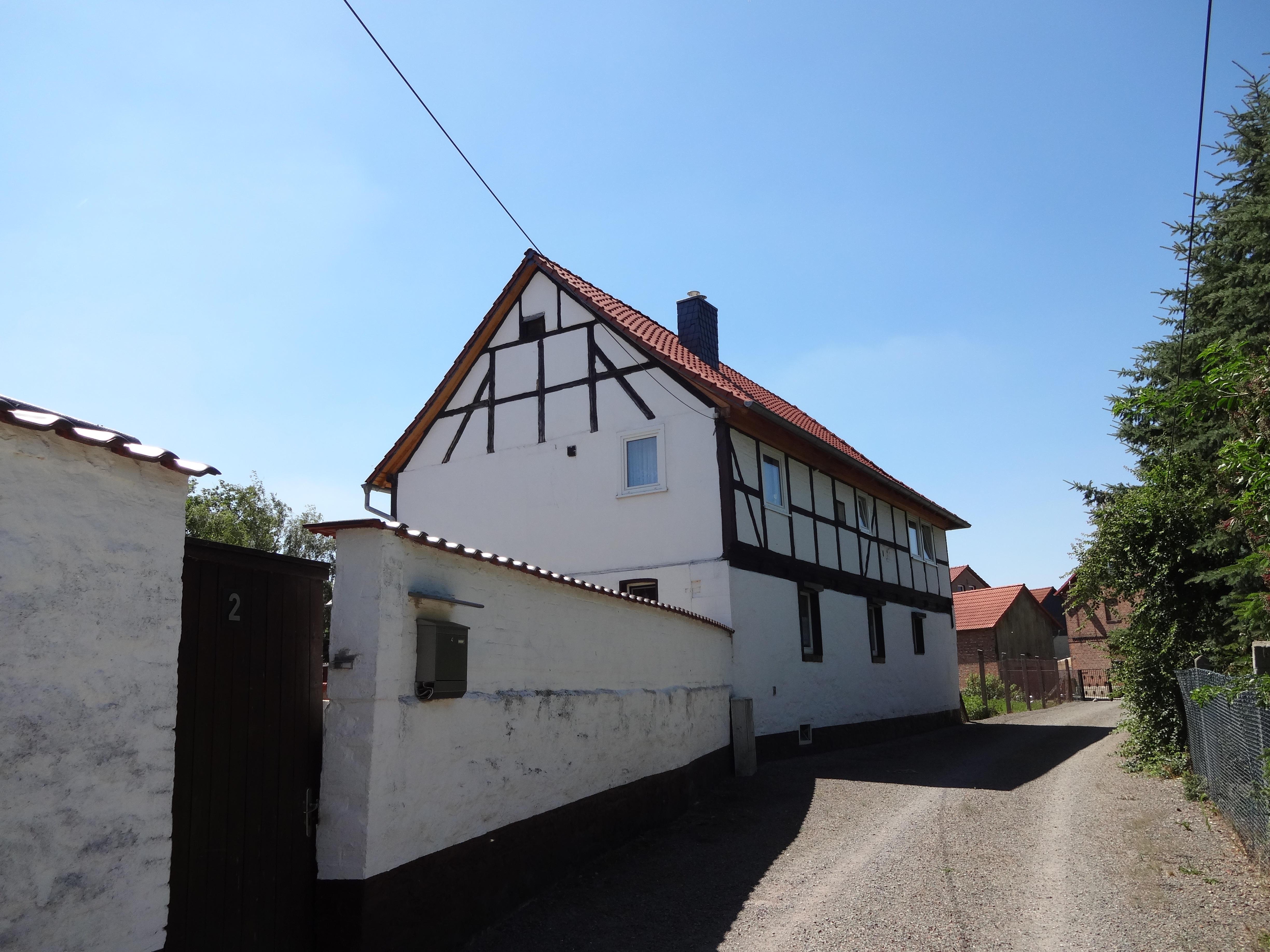 denkmalgeschütztes Bauernhaus in der Straße Im Winkel 2 in Dedeleben